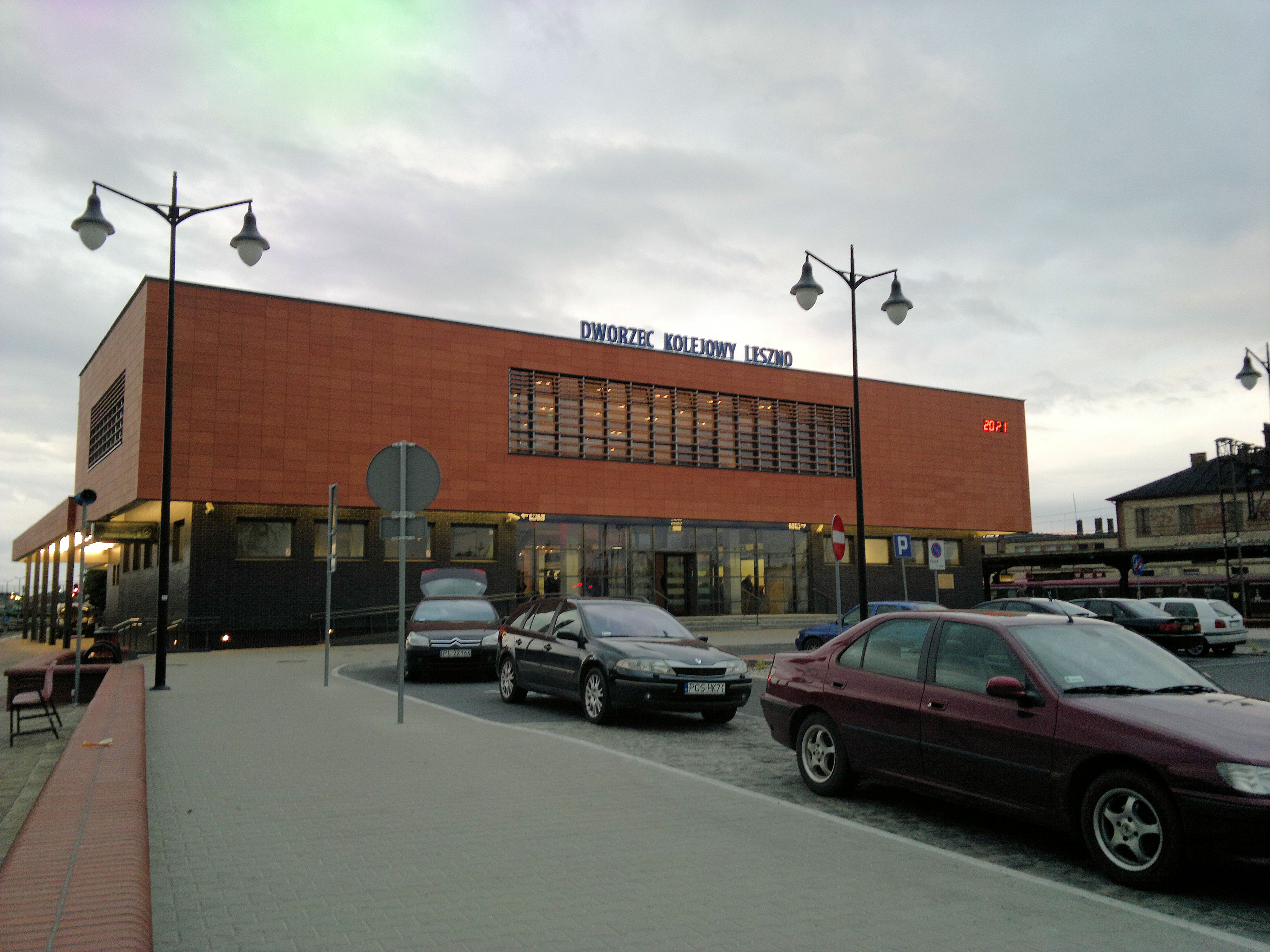 Polska, woj. wielkopolskie, Leszno, Plac przed zmodernizowanym dworcem kolejowym (widok z tarasu budynku)